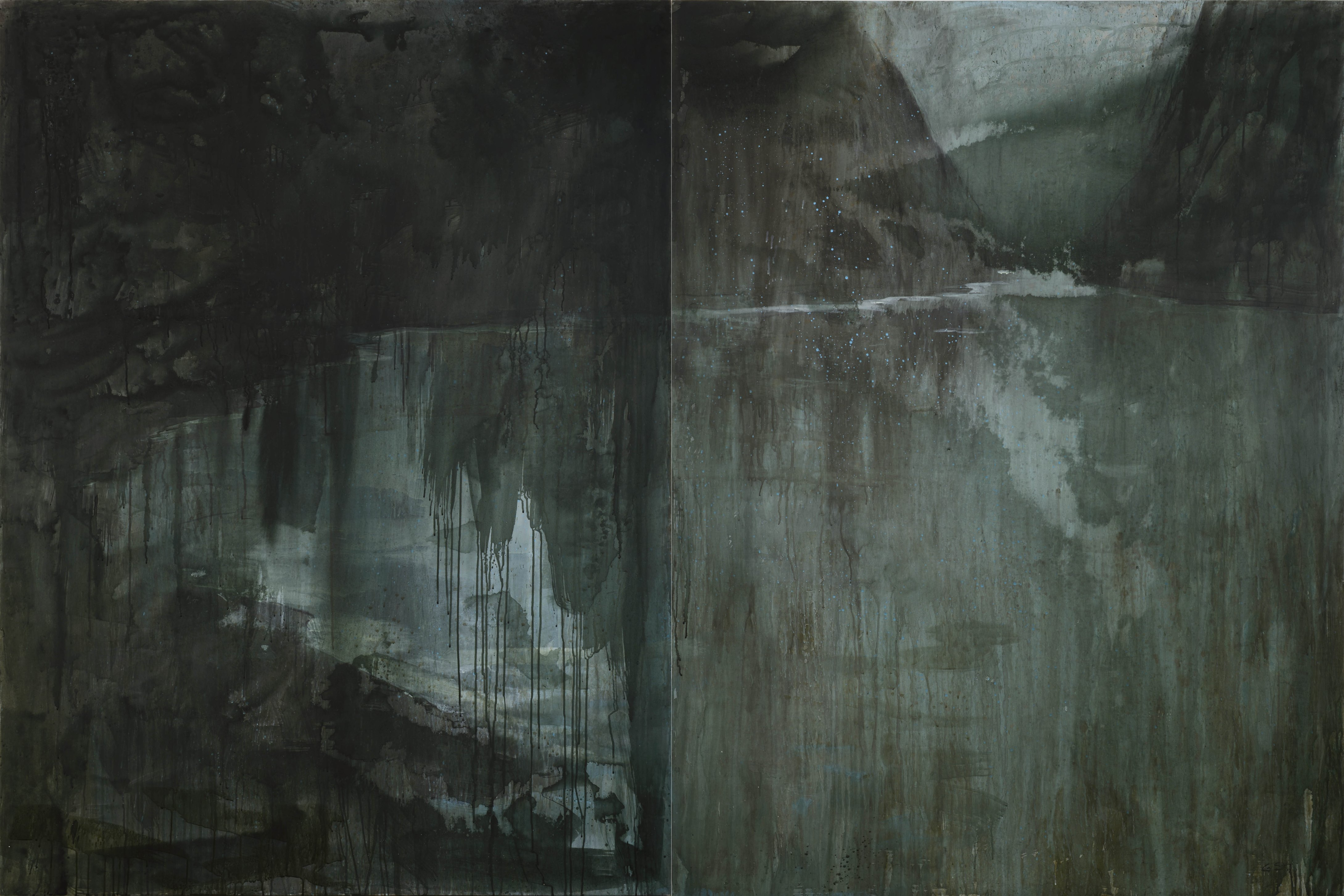 ( díptico) acrílico sobre tela, 180 x 135 cm c/u